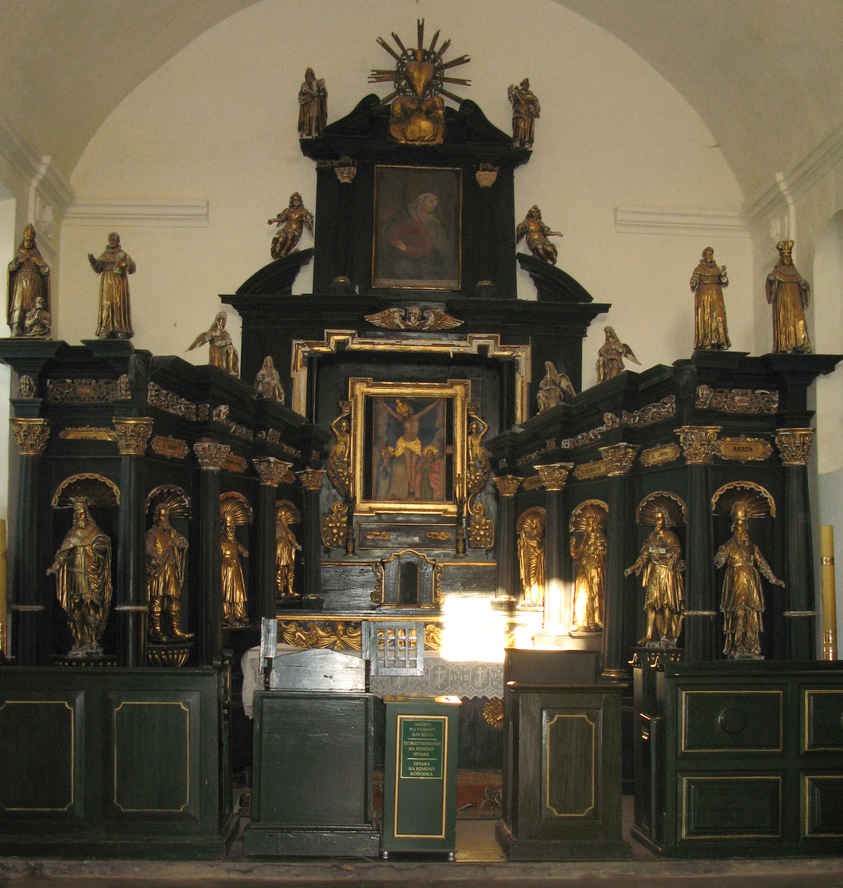 Беларуская (тарашкевіца): Комплекс былога кляштара бэрнардынцаў, дэкаратыўнае аздабленьне касьцёла: галоўны і бакавыя алтары росьпісы. в. Будслаў This is a photo of Belarusian heritage monument. Reference number: 611Г000422 ( WLM)